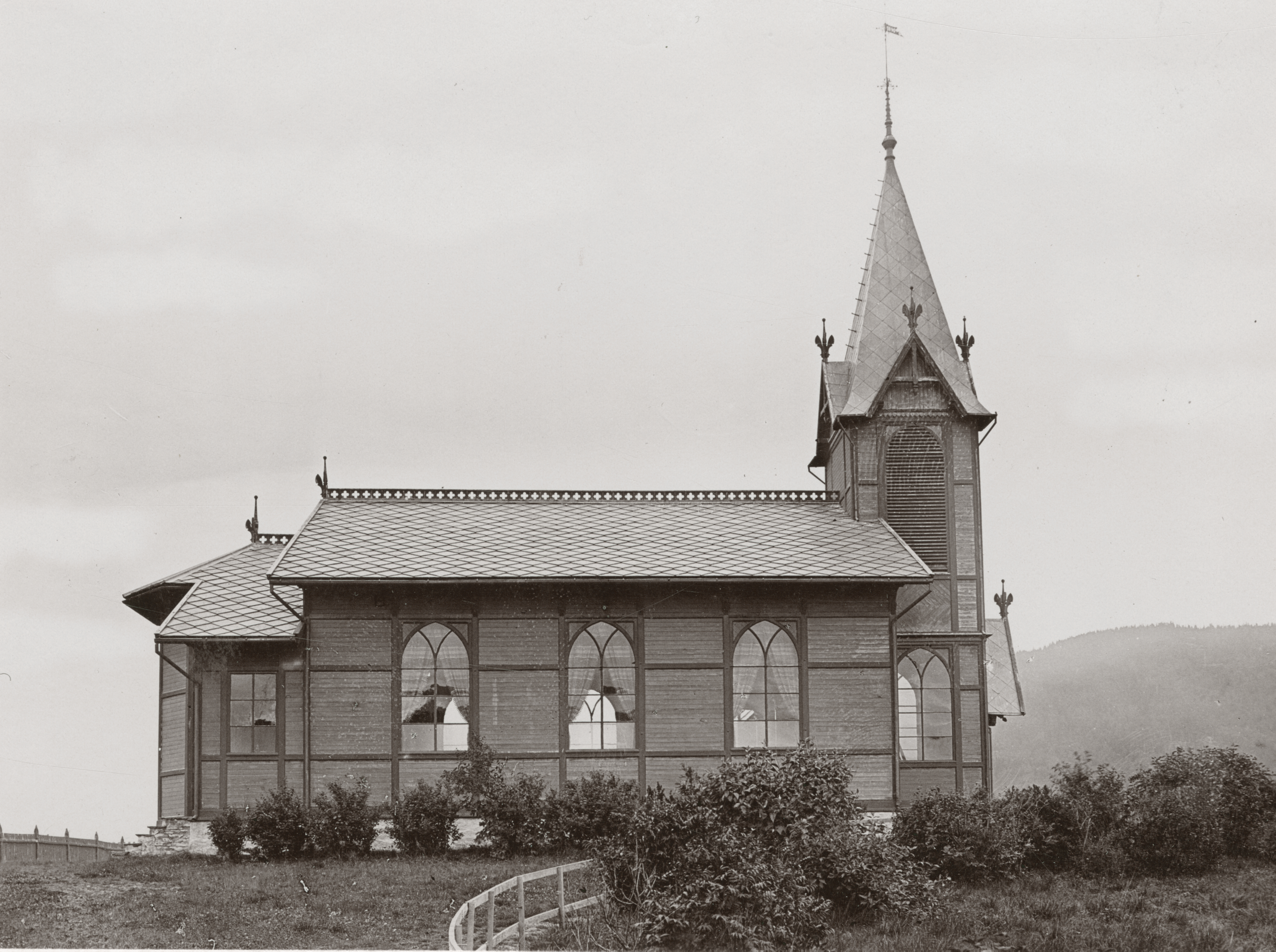 Orkanger kirke i Orkanger, Sør-Trøndelag This image on crowdsourcing geotagging platform Fotodugnad